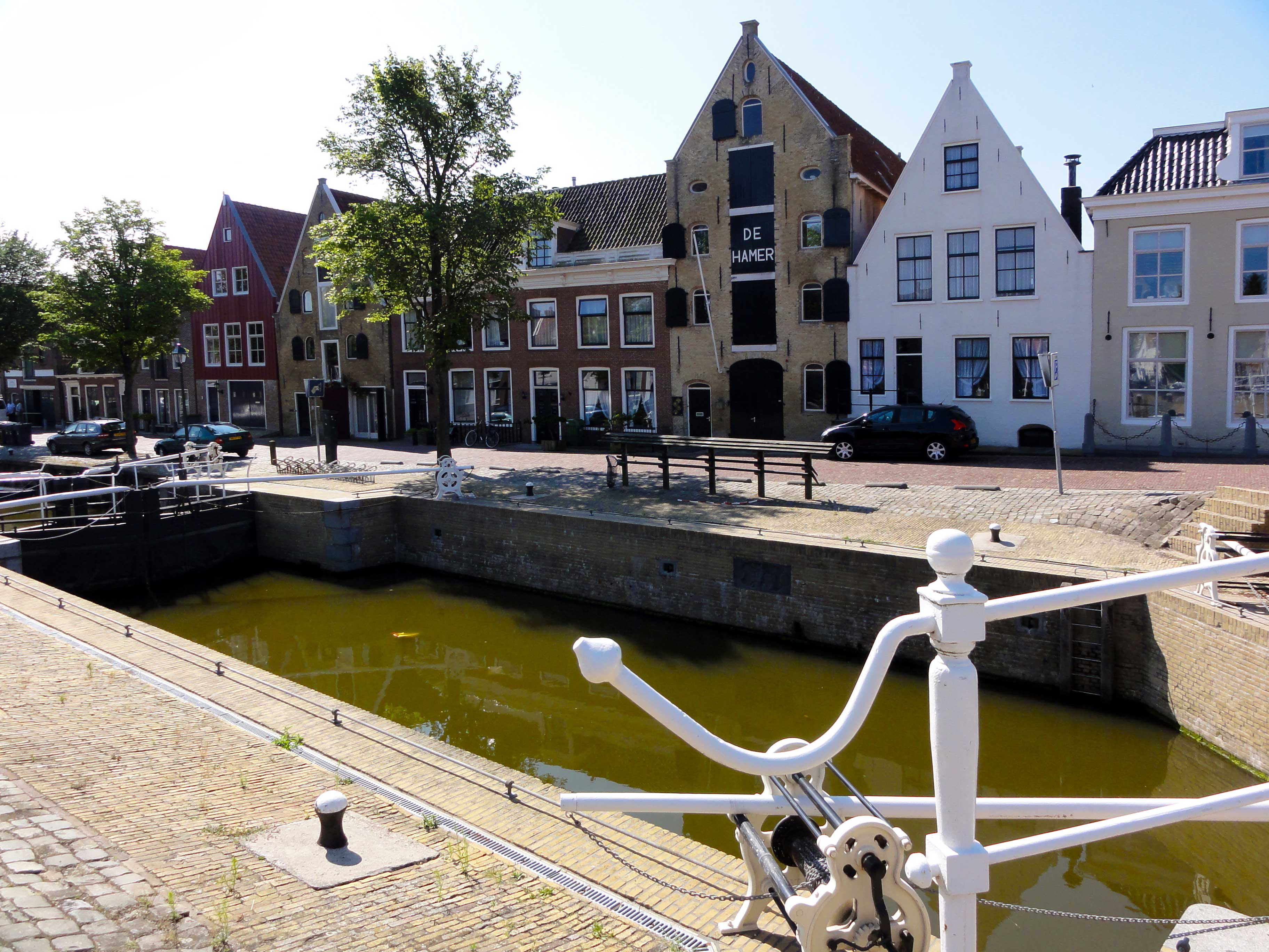 Rozengracht 6 t/m 10 met o.a. De Hamer en De Valk in Harlingen